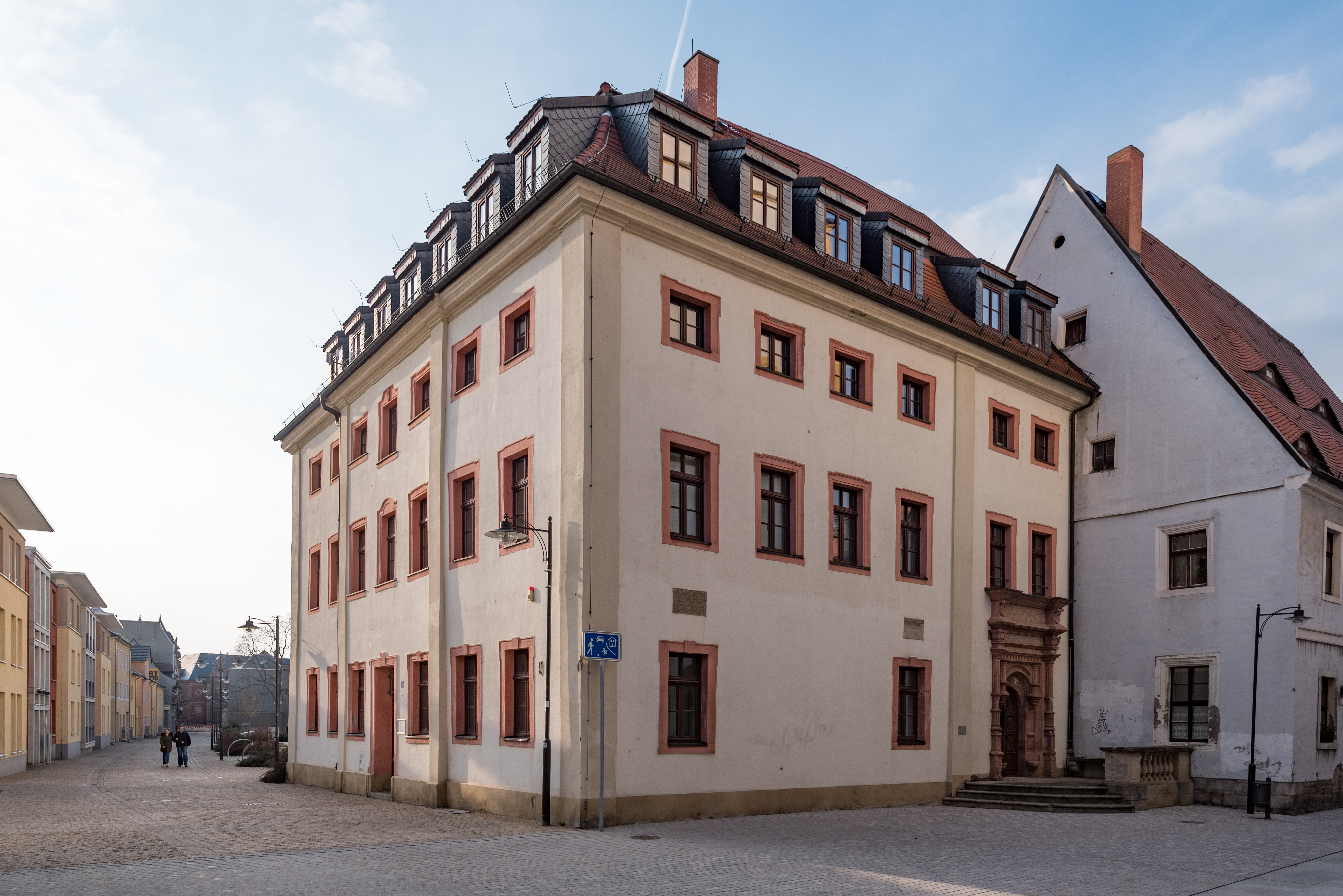 Weißenfels, Marienstraße 1a